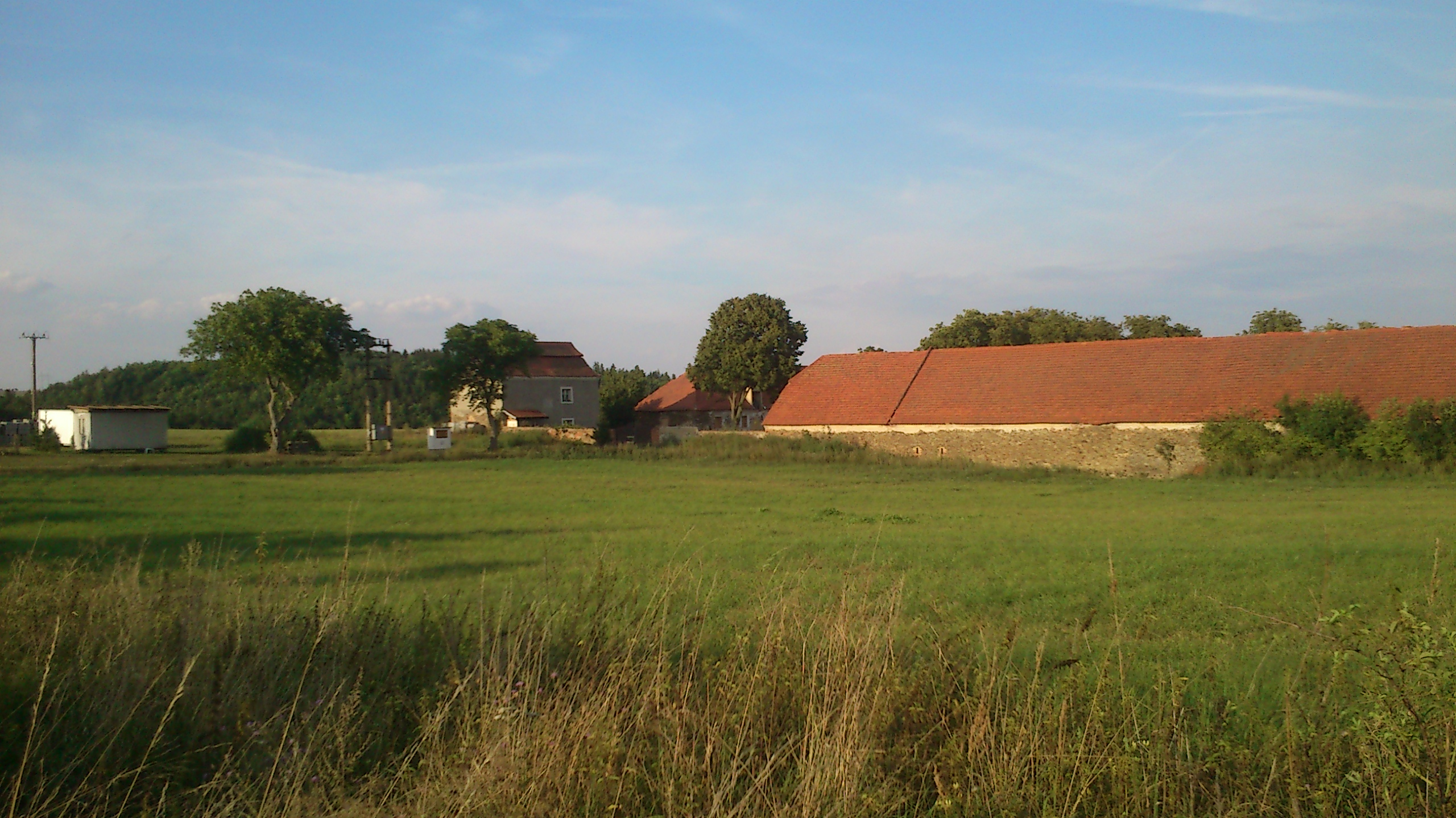 Zemědělský dvůr Sadlno (Slabce), Slabce 30